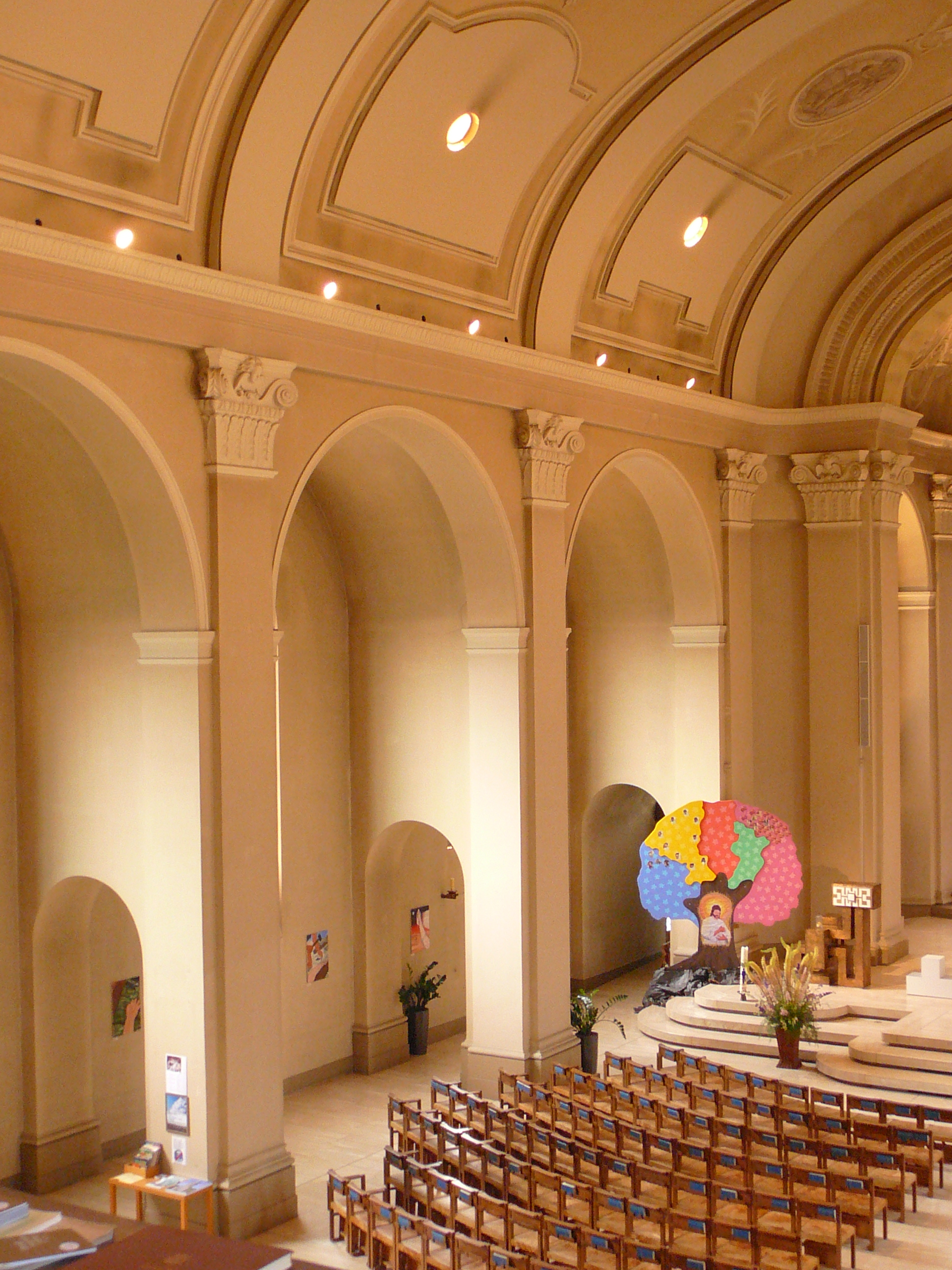 Römisch-katholische Pfarrkirche Guthirt, Zürich, Innenansicht